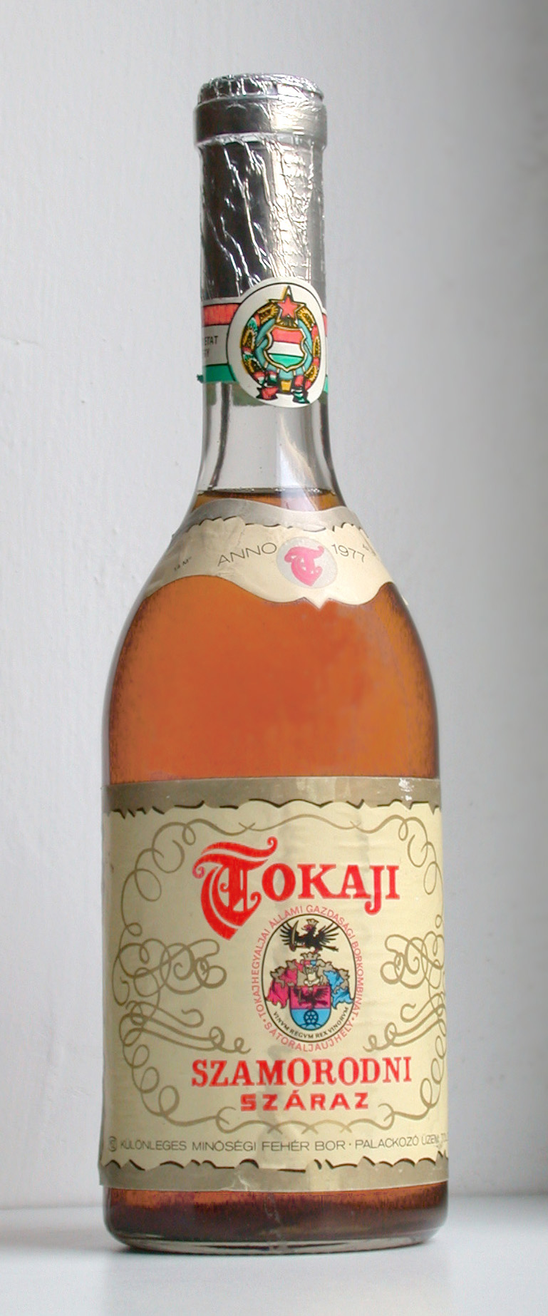 Tokaji Szamorodni. 1977. Korabeli címerrel.